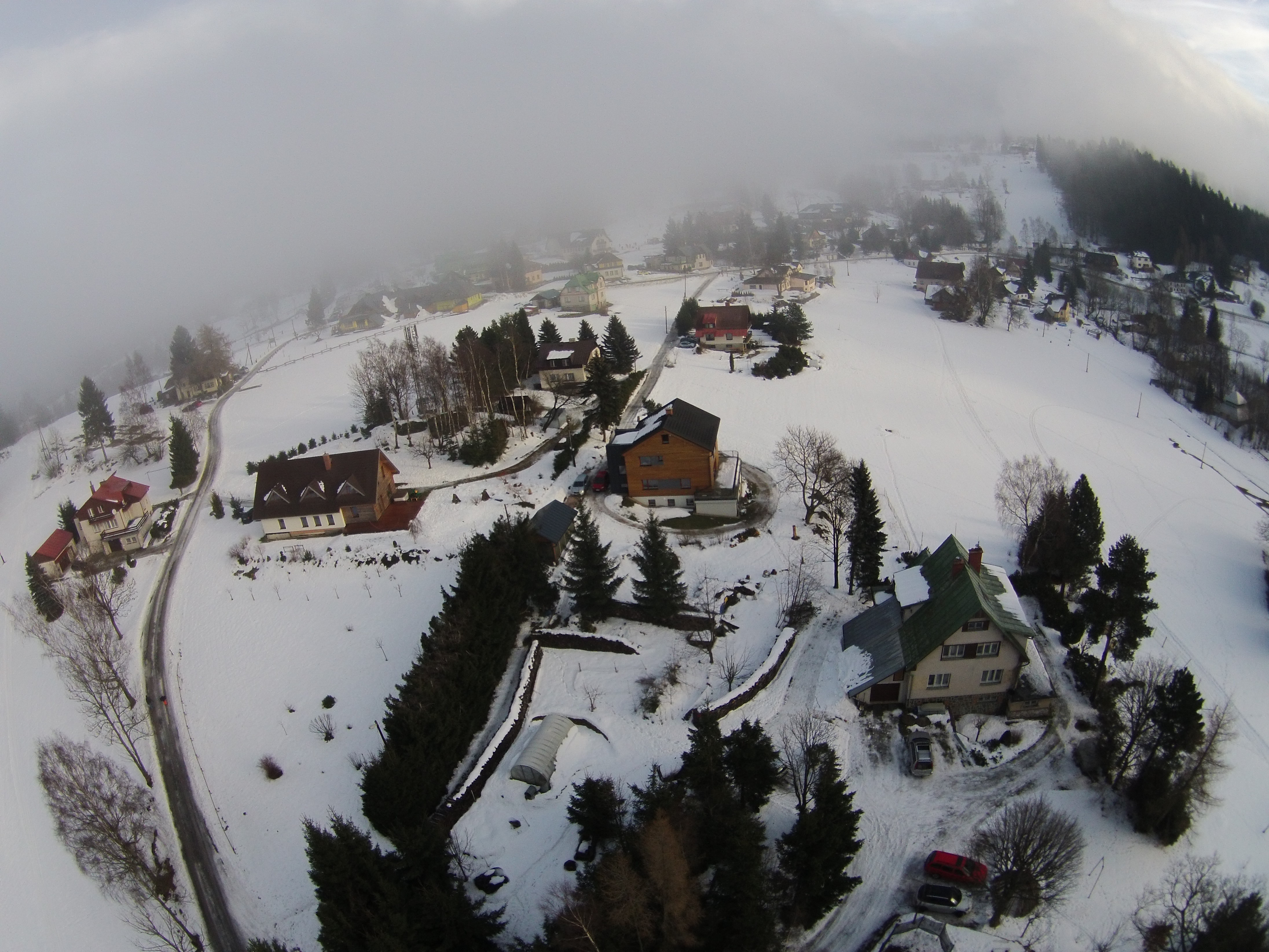 Domy. Rychlov (Benecko).